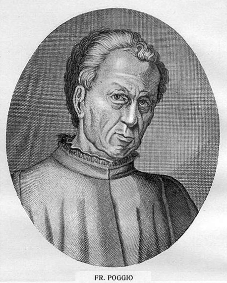 Gianfrancesco Poggio Bracciolini Gianfrancesco Poggio Bracciolini